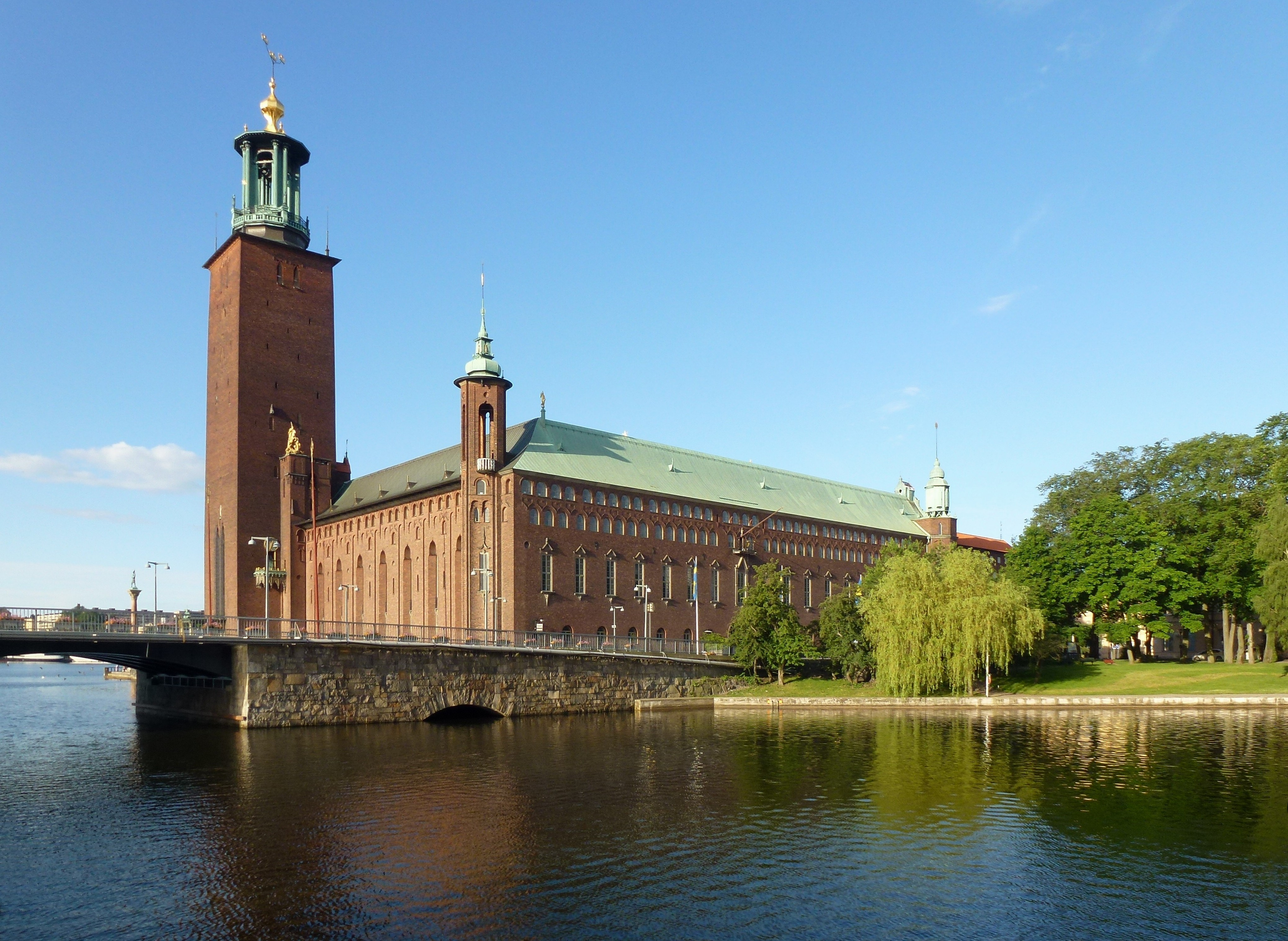 Stadshuset mot nordost